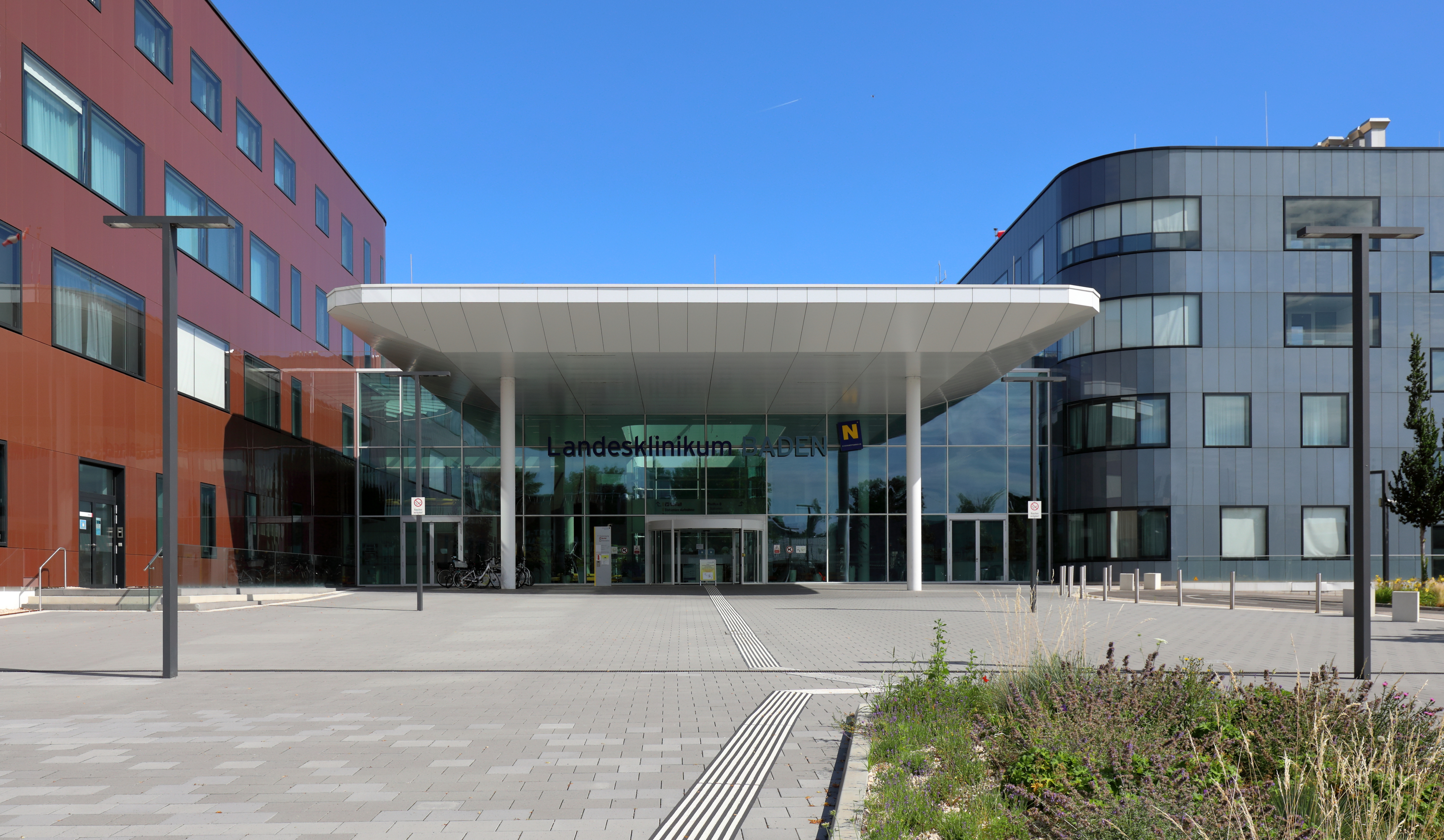 Südlicher Haupteingang des Landesklinikums in der niederösterreichischen Stadt Baden.Der Spatenstich für die Neuerrichtung des Landesklinikum fand im Februar 2010 statt und im September 2016 erfolgte die offizielle Eröffnung. Auf einer Bruttogeschoßfläche von 64.000 Quadratmetern (Nettonutzfläche rund 30.980 m²) wurde östlich des bestehenden Krankenhauses der Klinikneubau mit drei Pavillons und einer zentralen Eingangshalle nach Plänen der Arbeitsgemeinschaft Moser Architekten Ziviltechniker GmbH und Architekt DI Franz Pfeil Ziviltechniker GmbH um rund 190 Millionen Euro errichtet. Das Klinikum bietet 443 Betten, davon 24 Intensivbetten und 20 Dialyseplätze, sowie sechs hochmoderne OP-Säle.